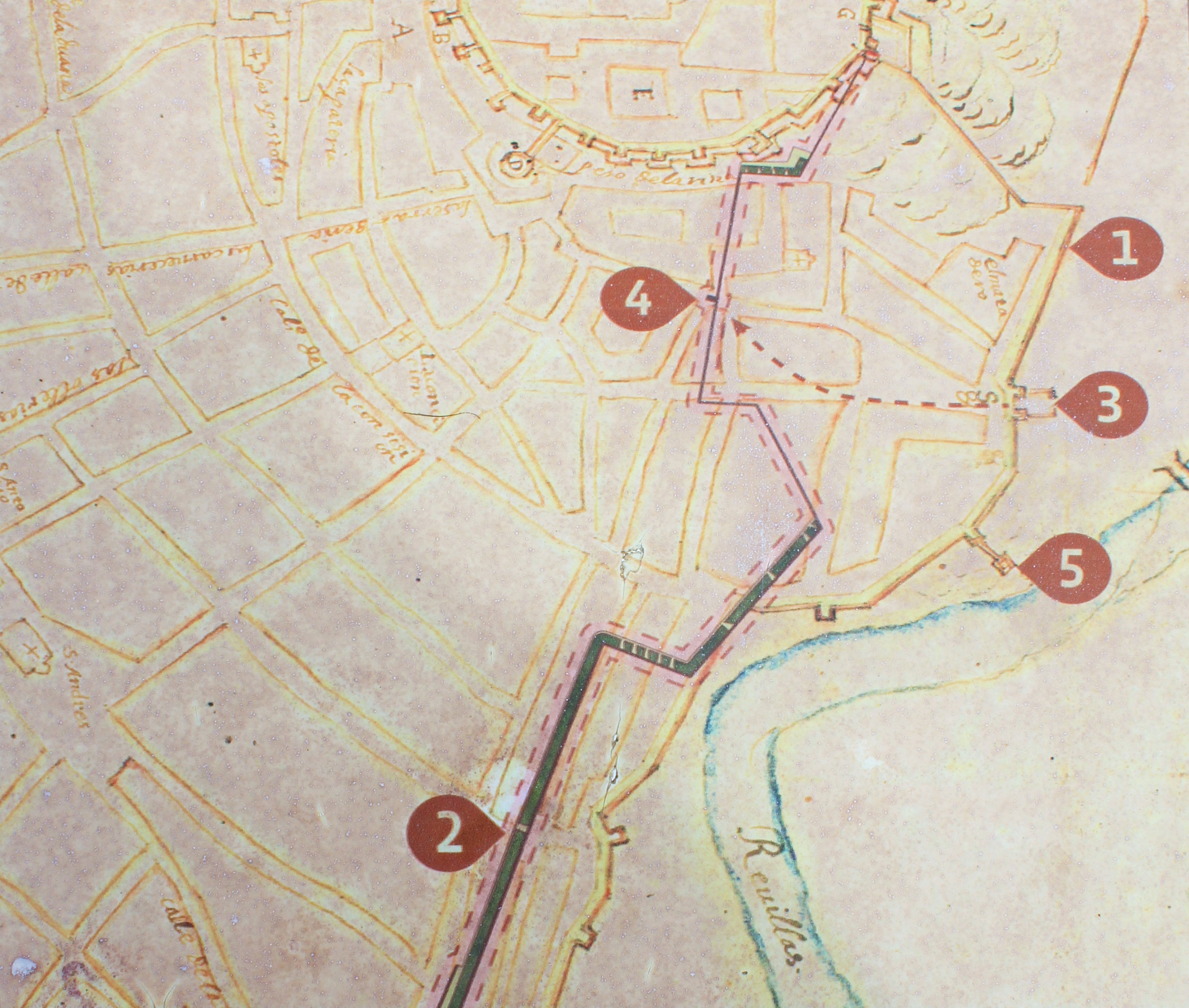 Esquema que diferencia la muralla de La Alcazaba (1), el traslado de la Puerta de Mérida de (3) a (4) y el nuevo recinto abaluartado (2).